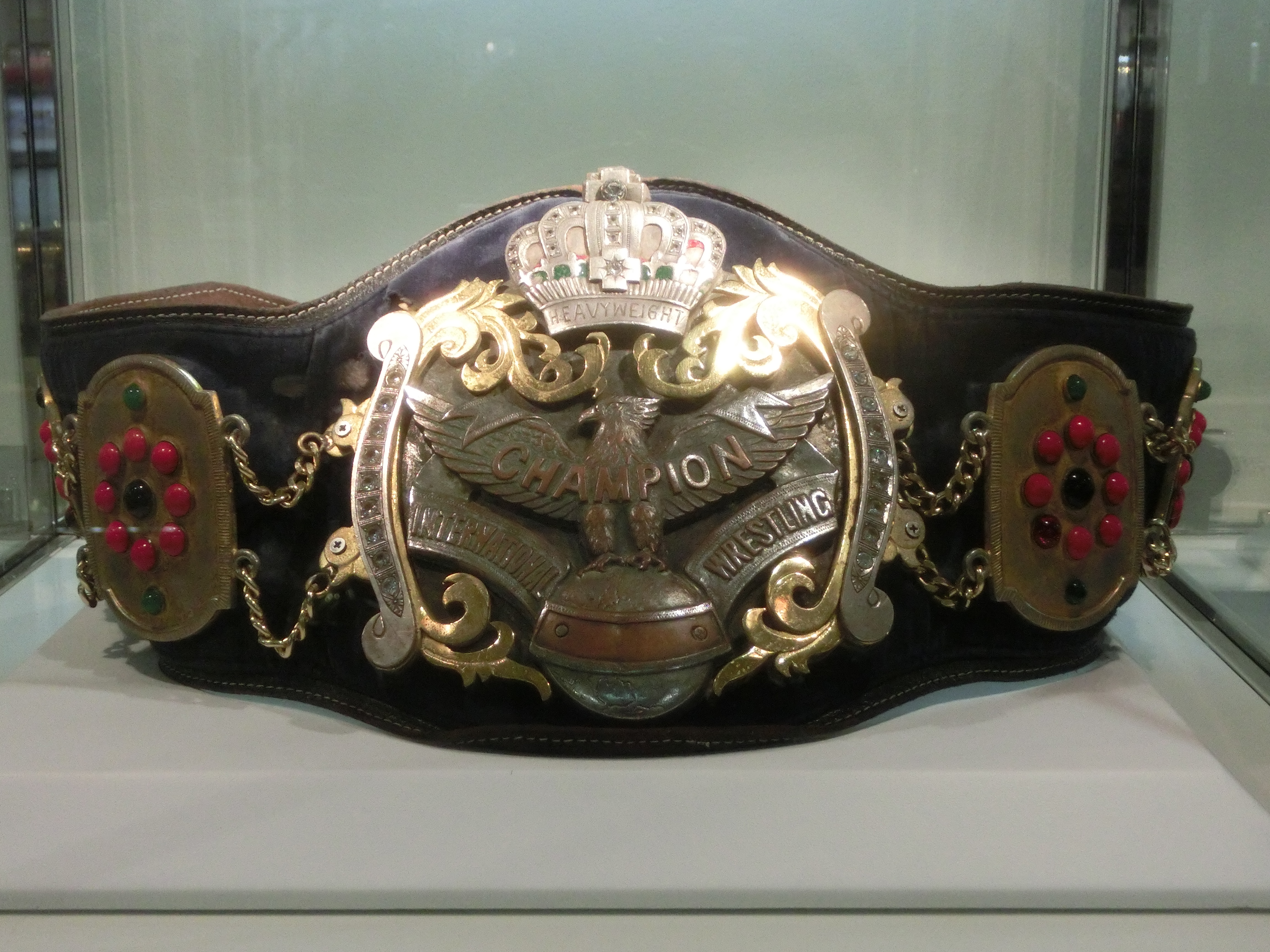 インターナショナル・ヘビー級王座（1958年制作）渋谷「ジャイアント馬場 20thメモリアル. ～ジャイアント馬場展」撮影（2019年）